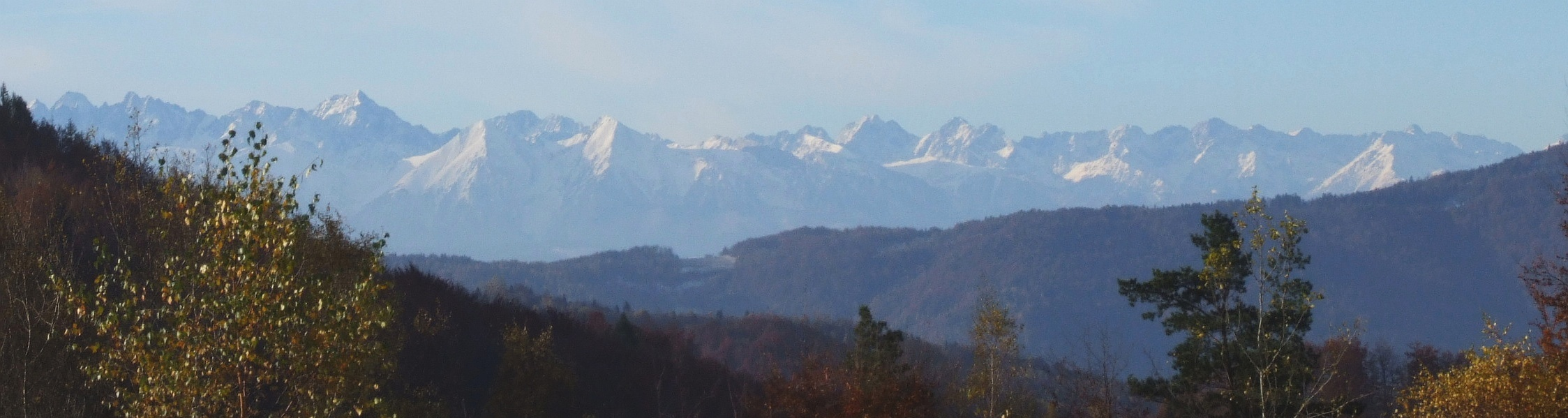 Widok z Cebulówki na Tatry Wysokie